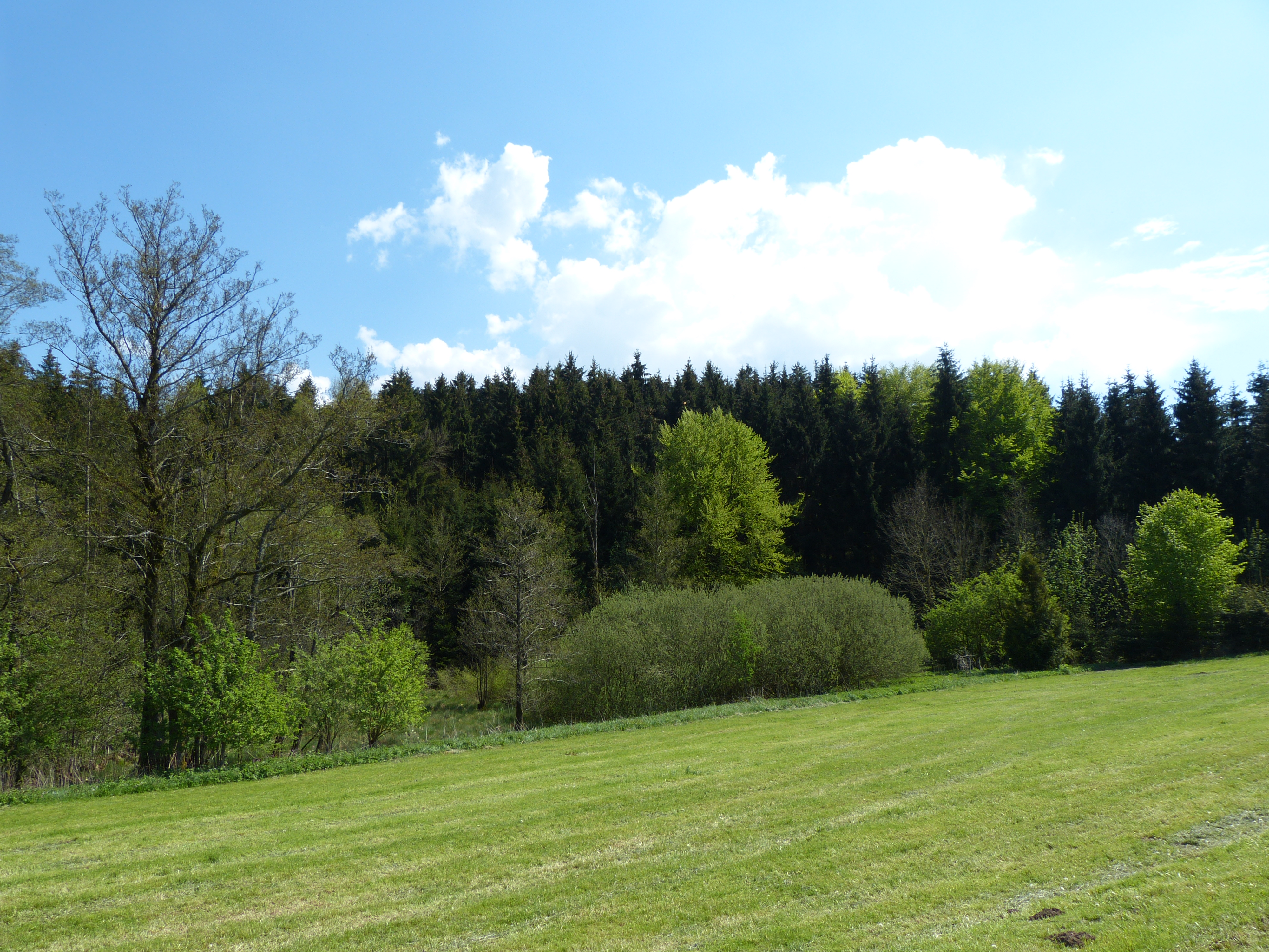 Toteisloch SW von Herbisried (Bad Grönenbach), Geotop Nr. 778R002